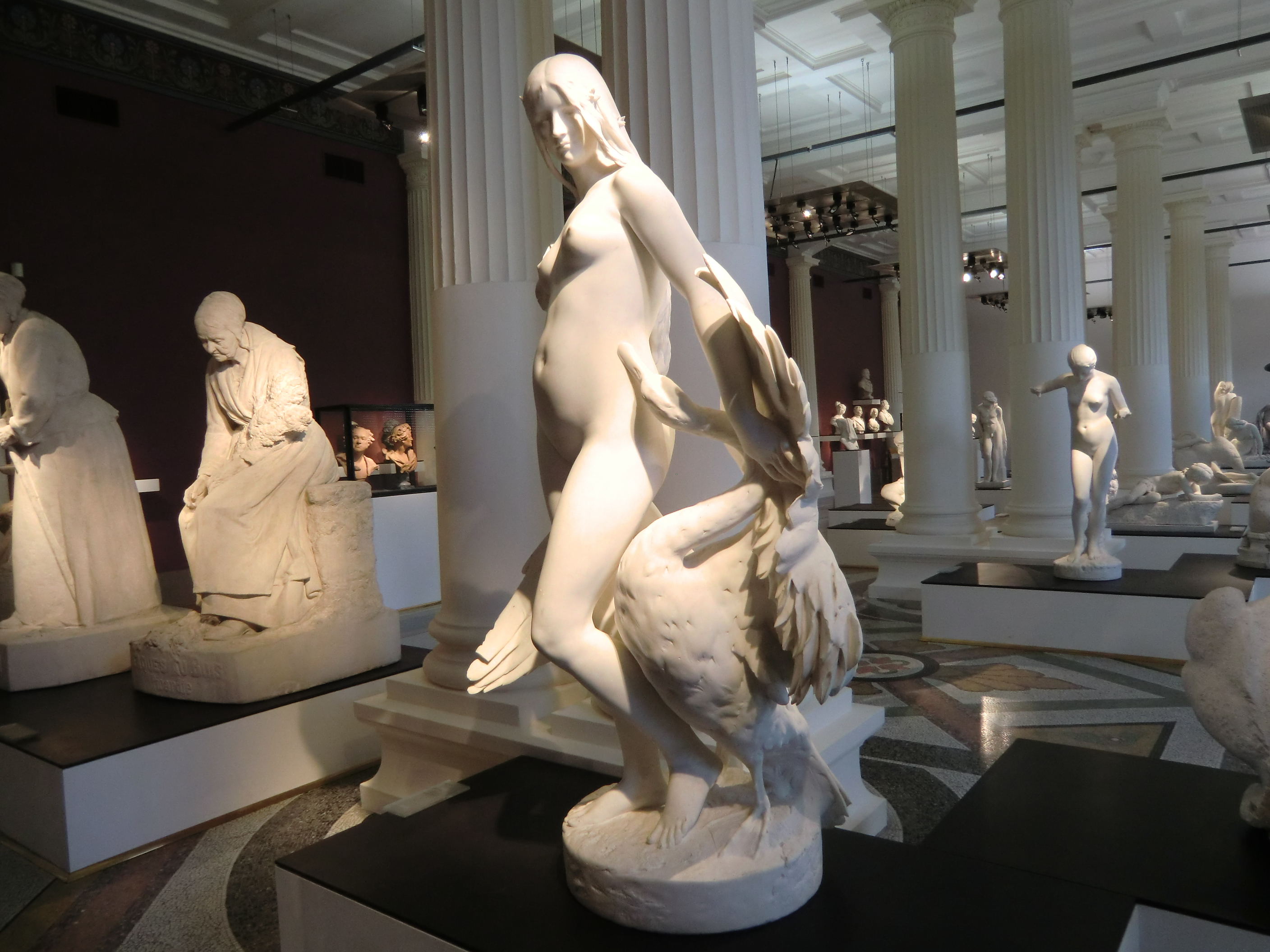 Sculpture du Musée de Picardie